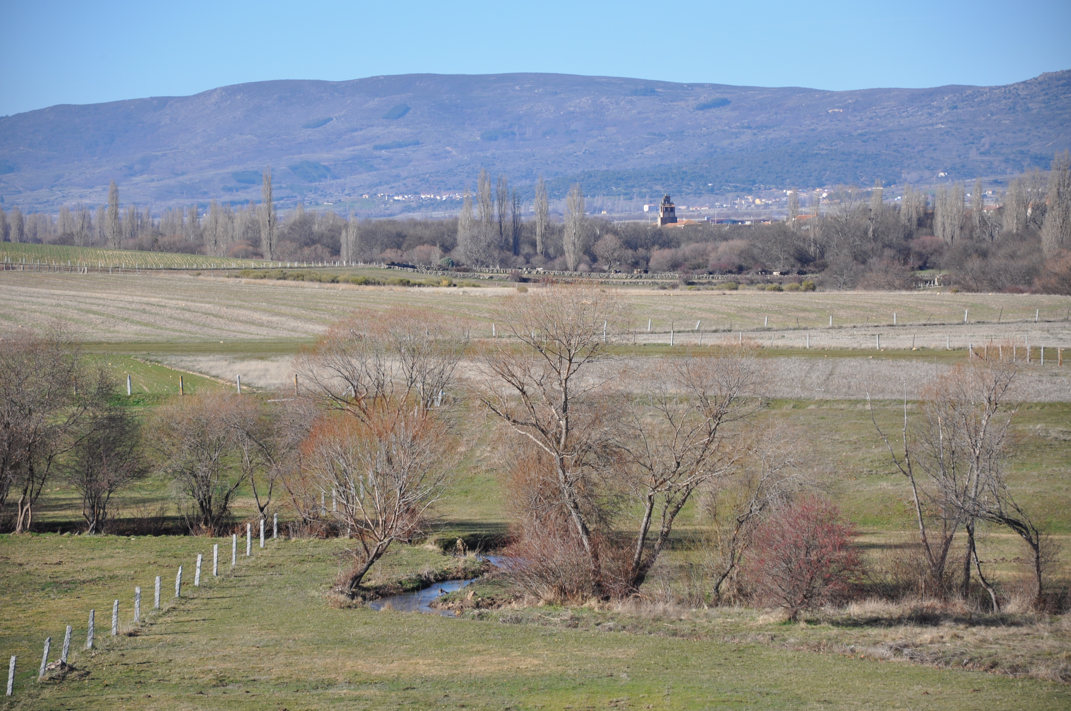 Panorámica de Blacha y río de la Hija afluente del Adaja, La Torre, Ávila, España.